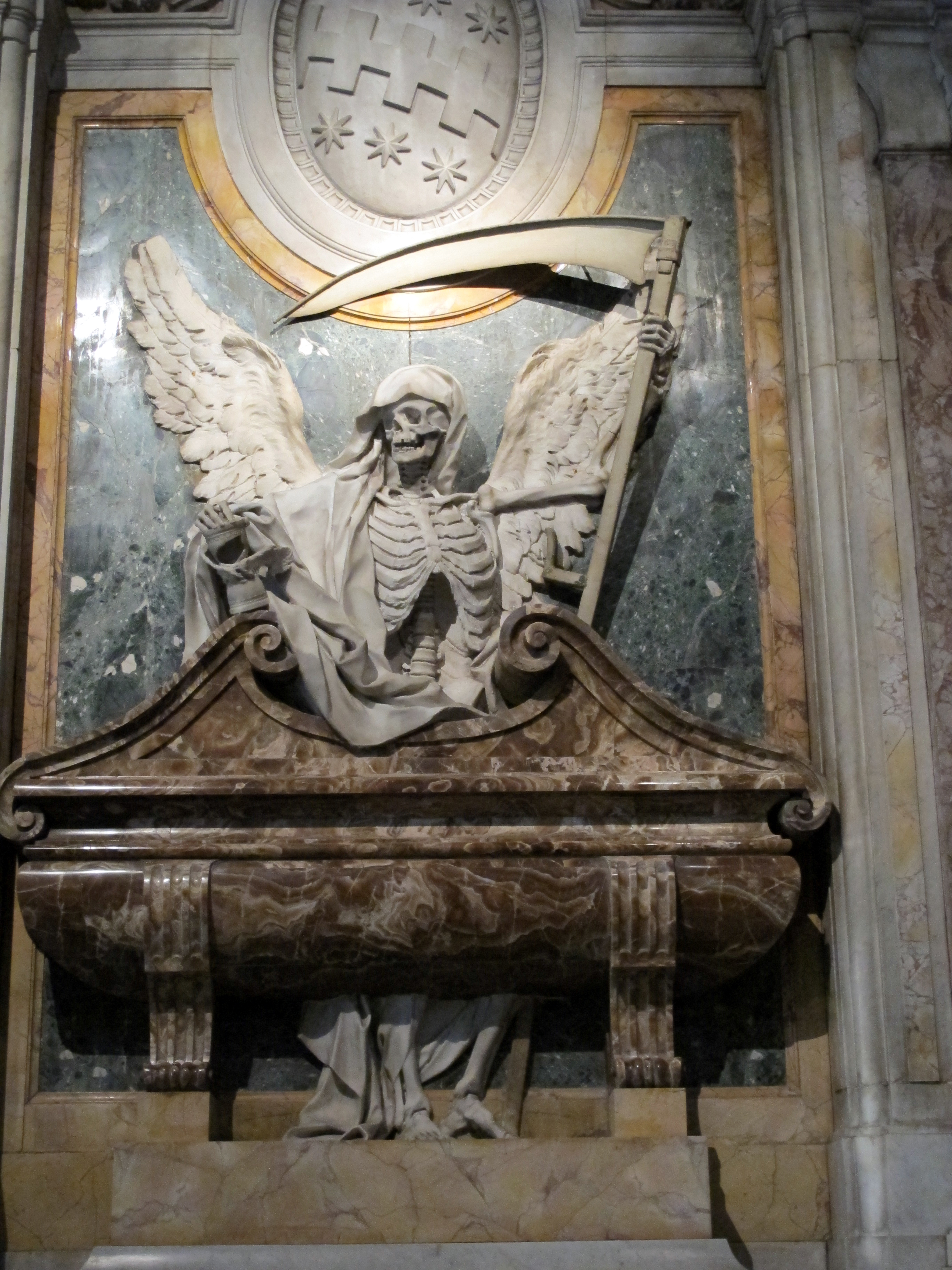 San pietro in vincoli, monumento al cardinale cinzio aldobrandini